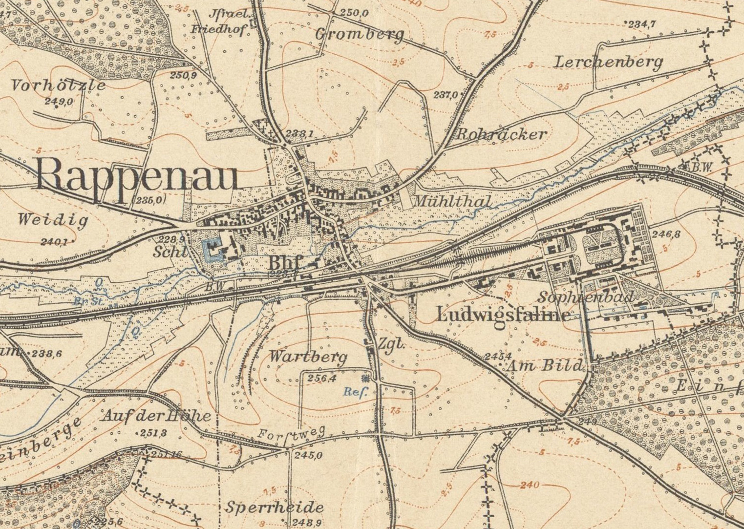 Rappenau mit Saline. Ausschnitt aus Neue Topographische Karte des Königreichs Württemberg im Maßstab von 1:25000, Blatt 14, Gundelsheim (nach heutiger Einteilung Blatt 6720). Kupferstich von Hugo Petters.